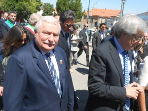 Lech Walesa al Sacrario delle Vittime sul Lavoro con la Ugl